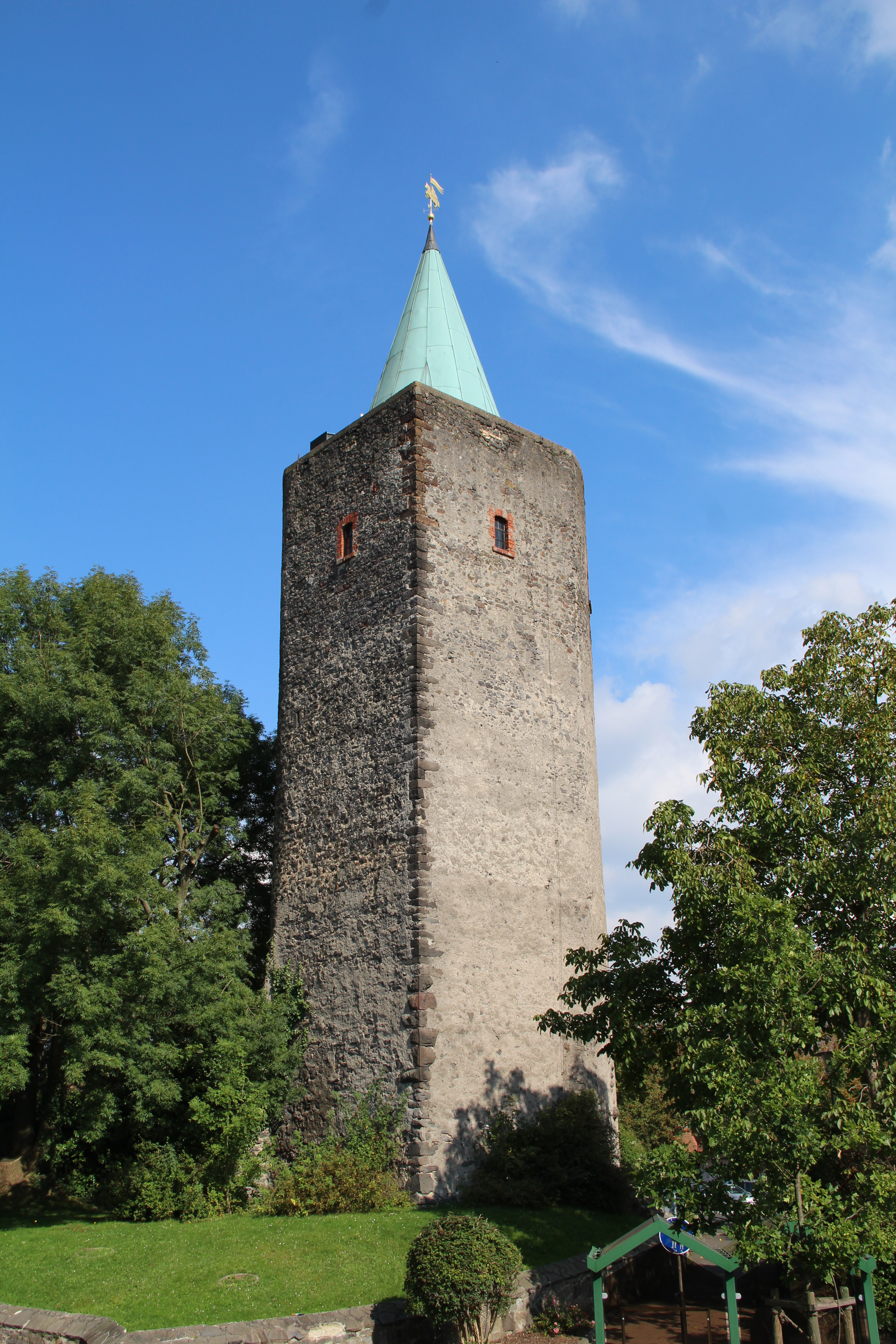 Diebstrum